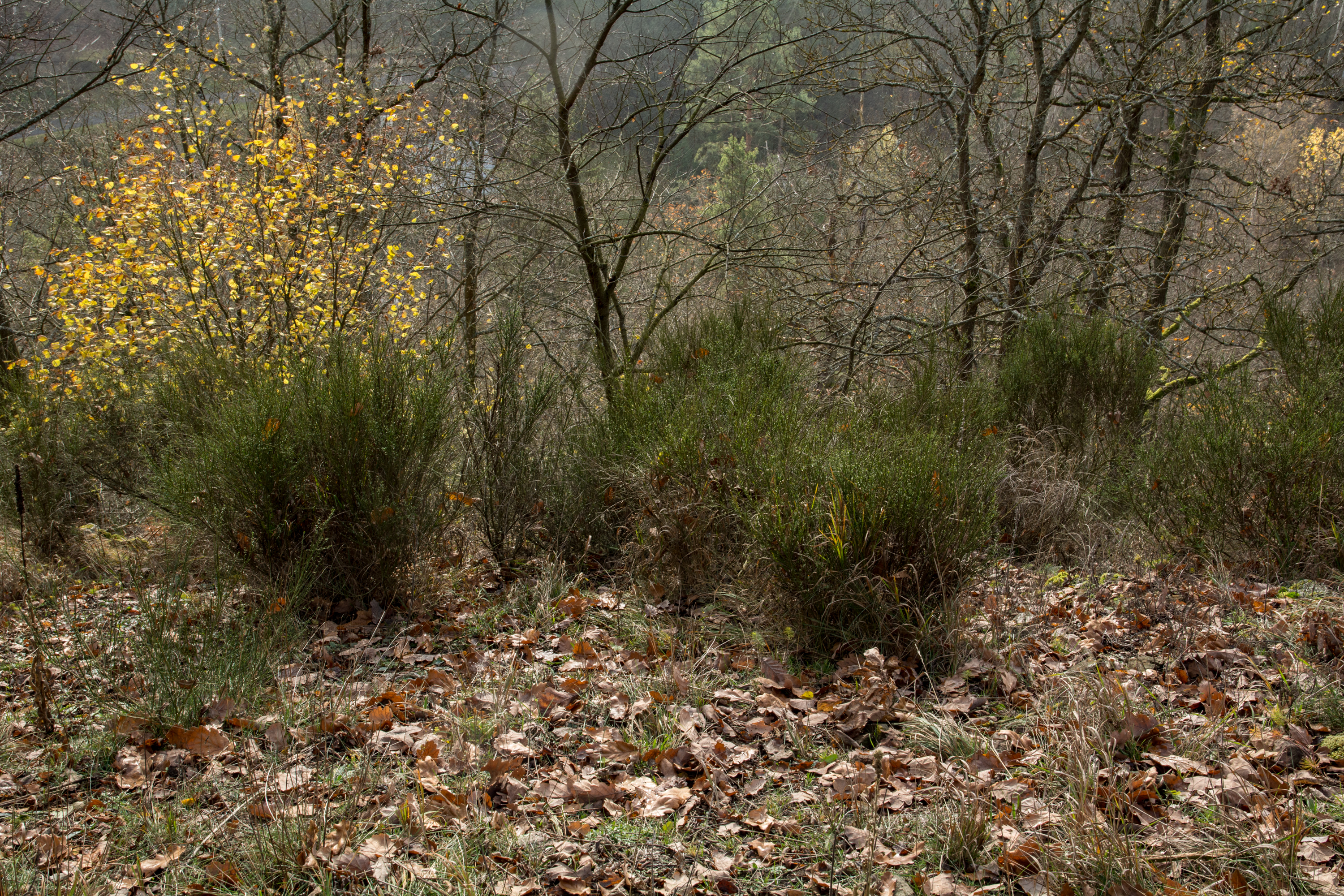 Porost trnovníku akátu v PR Pavlovická stráň